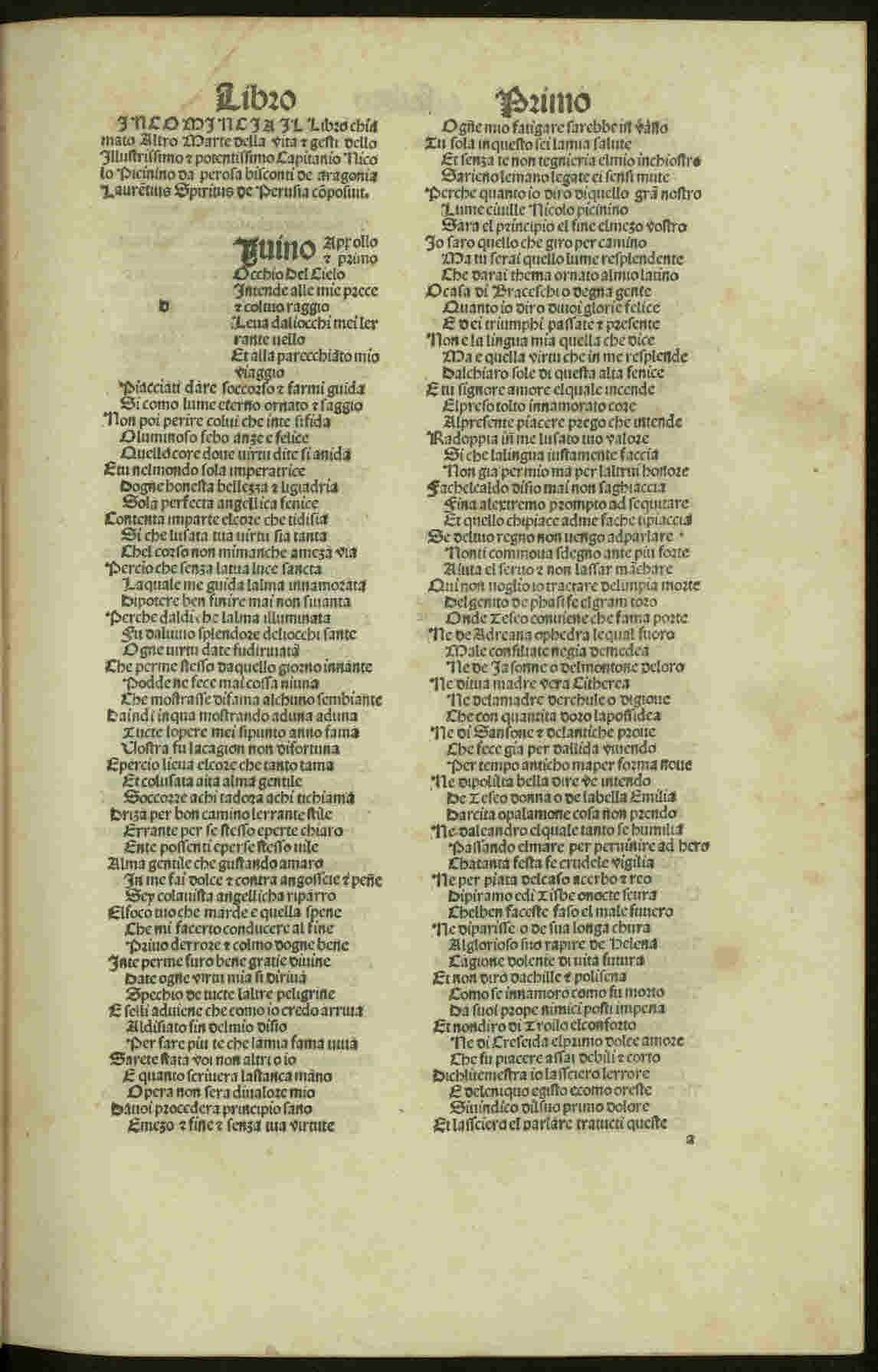 Altro Marte. - Stampata in Vicenza : [Leonardus Achates : de Basilea], adi VIIII de aprile del MCCCCLXXXVIIII. - 88 c. ; [*]⁴, a-o⁶ ; fol. .